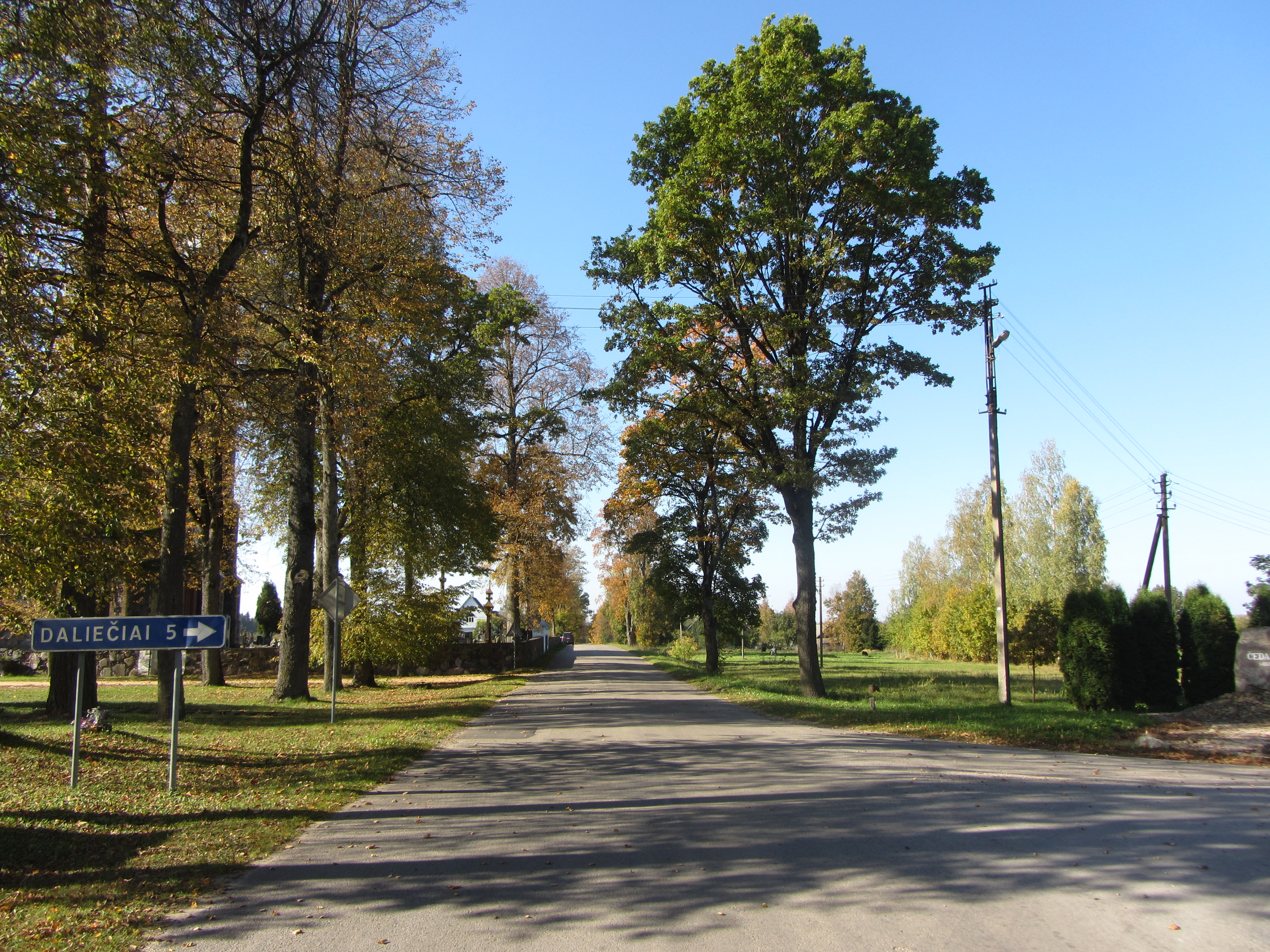 Čedasai, Lithuania